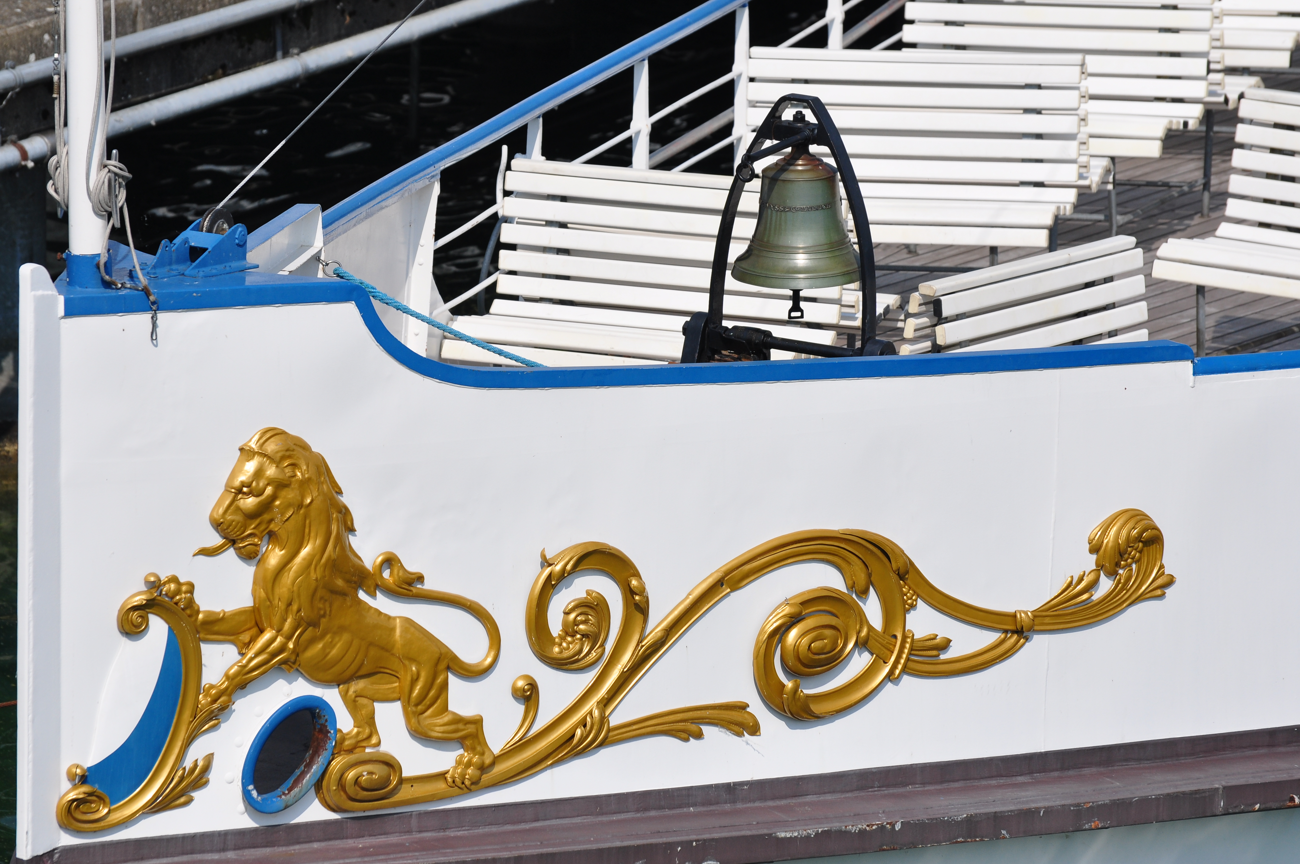 Zürichsee-Schiffahrtsgesellschaft (ZSG) Werft in Zürich-Wollishofen (Switzerland) : Stadt Zürich